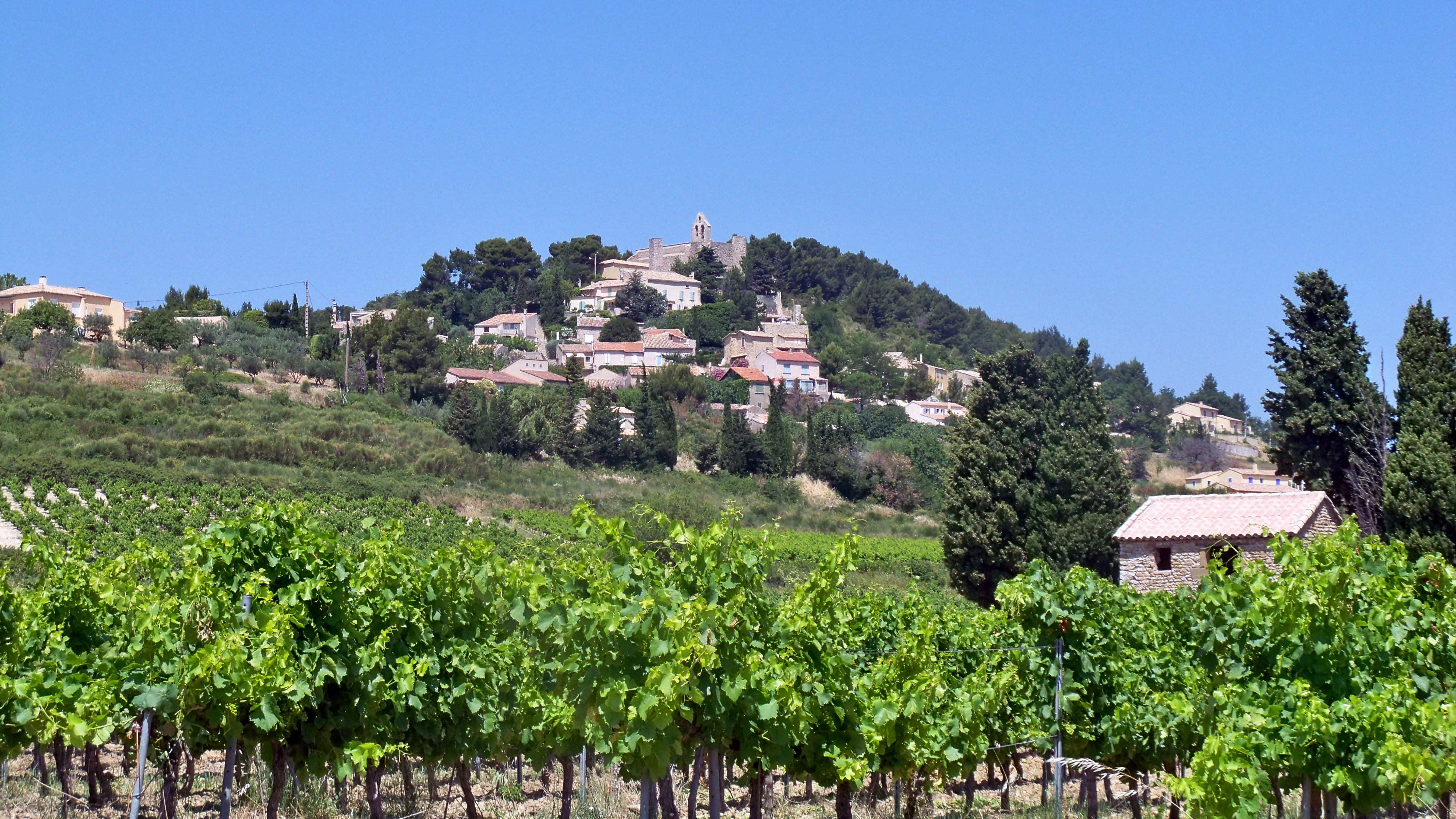 Vue générale d Rasteau, Vaucluse